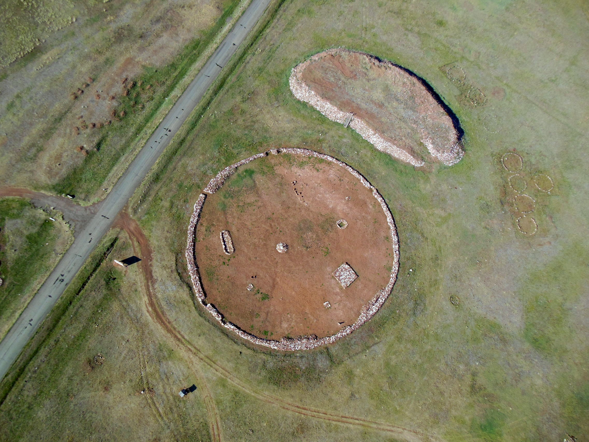 Долина Царей. Тыва. Пий-Хемский кожуун.